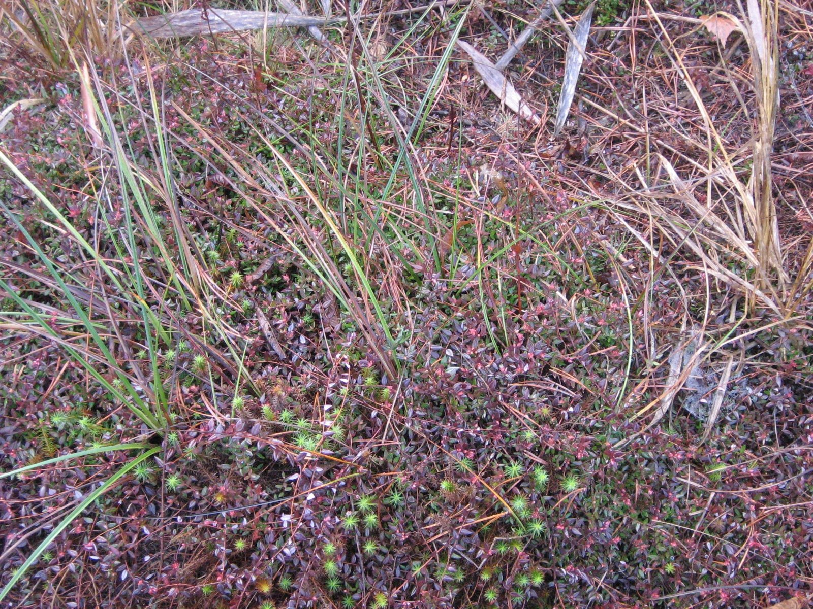 Moorbodenvegetation im Verlandungsbereich des Luchsees, des Kolks des gleichnamigen Kesselmoores in den Krausnicker Bergen im „Landkreis Dahme Spreewald“ in „Brandenburg“, „Deutschland“